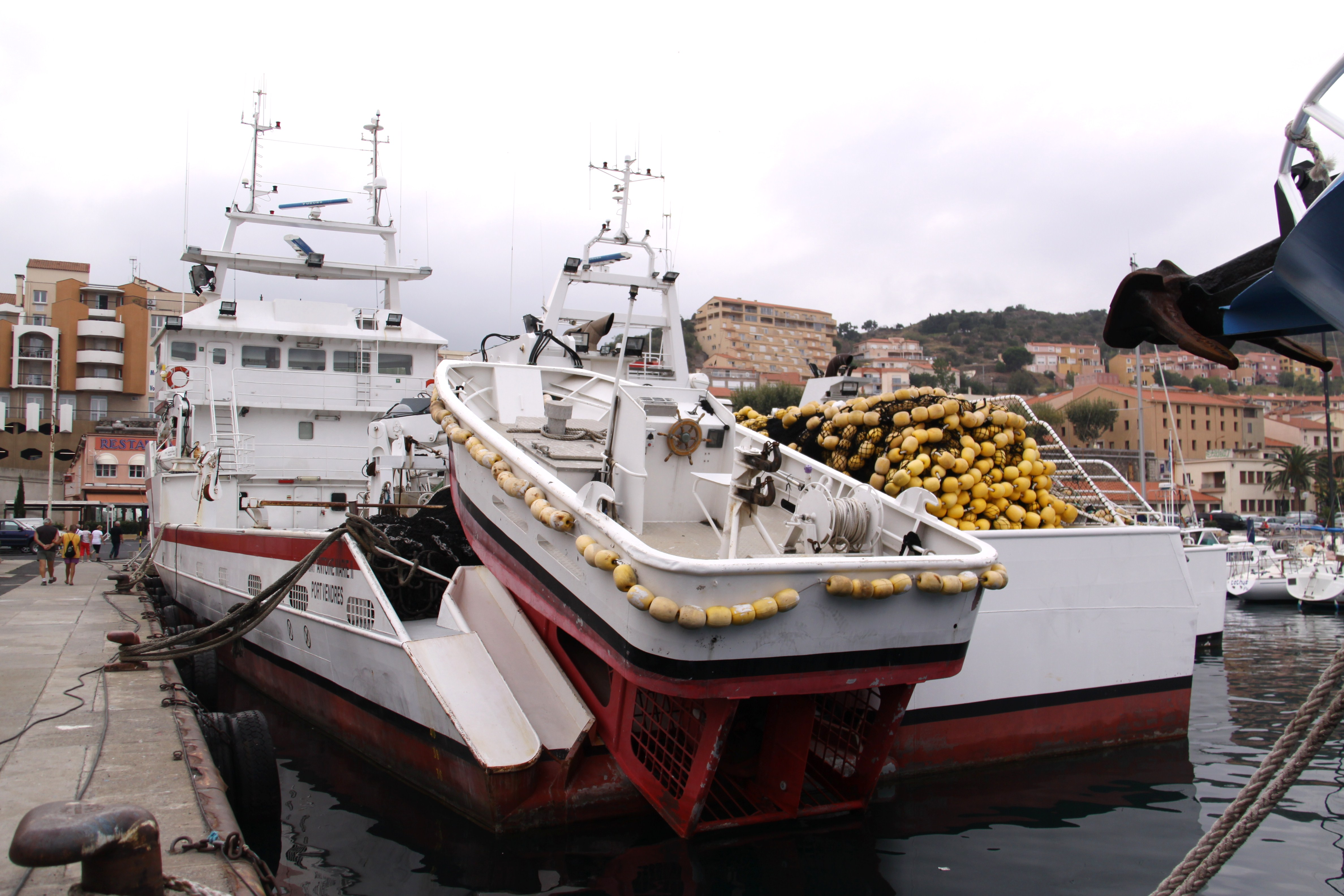 L' arrière du thonier-seneur "Saint Antoine Marie II" où sont situés le skiff et la senne (le filet de pêche). Le thonier-senneur "Saint Antoine Marie II" a été construit en 2004 aux chantiers Piriou de Concarneau. Il mesure 43,10 mètres de long et 9,50 mètres de large. Il est équipé de deux moteurs de 400 kw. Il a des installations frigorifiques consistant en 5 cuves à poisson d' un volume total de 253 m3 et des machines à fabriquer la glace (glace écaille et liquide). Immatriculation: PV 916346. Port-Vendres, Pyrénées-Orientales, France.